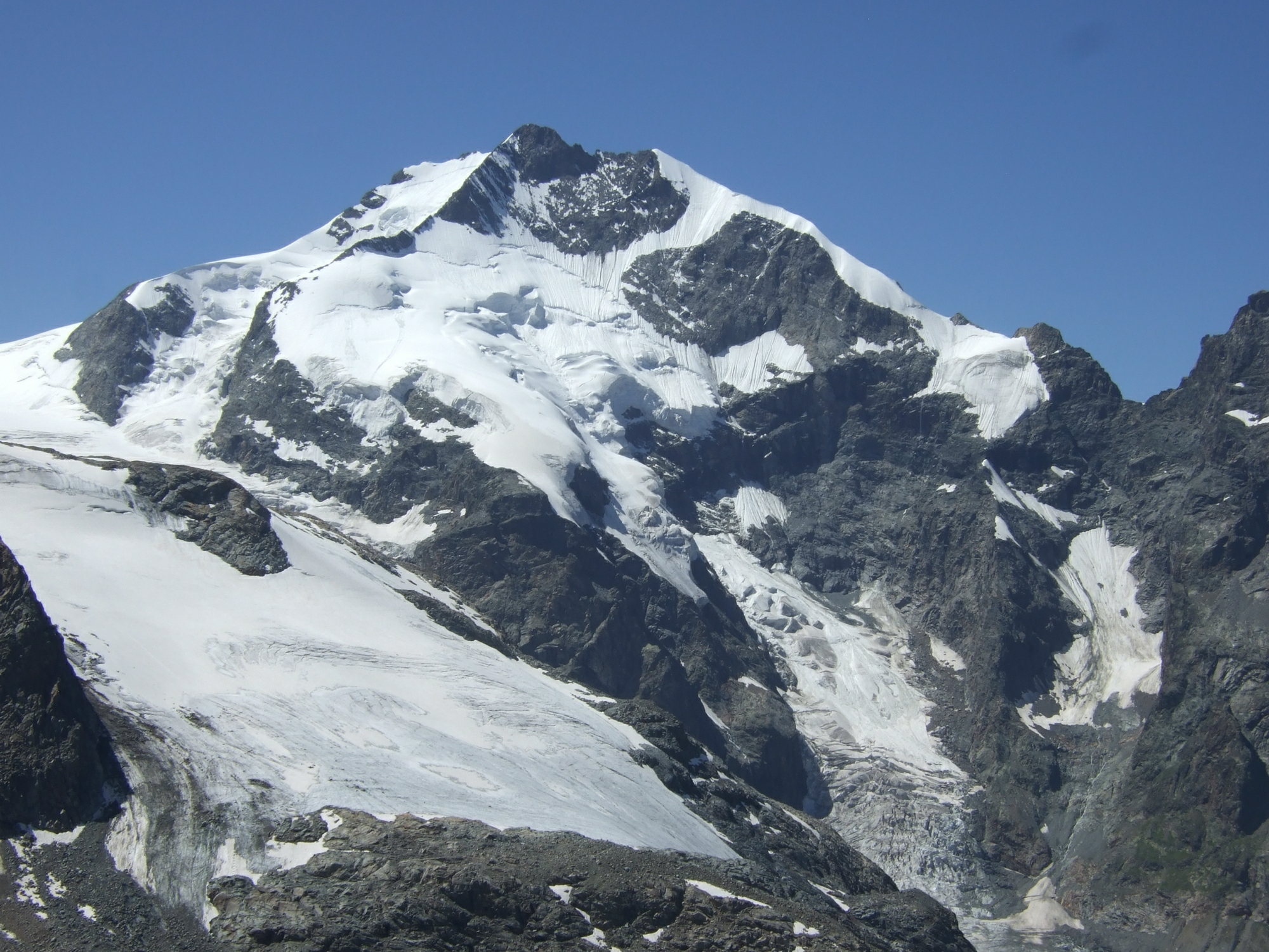 Piz Bernina, Schweiz, von der Diavolezza aus gesehen, August 2008